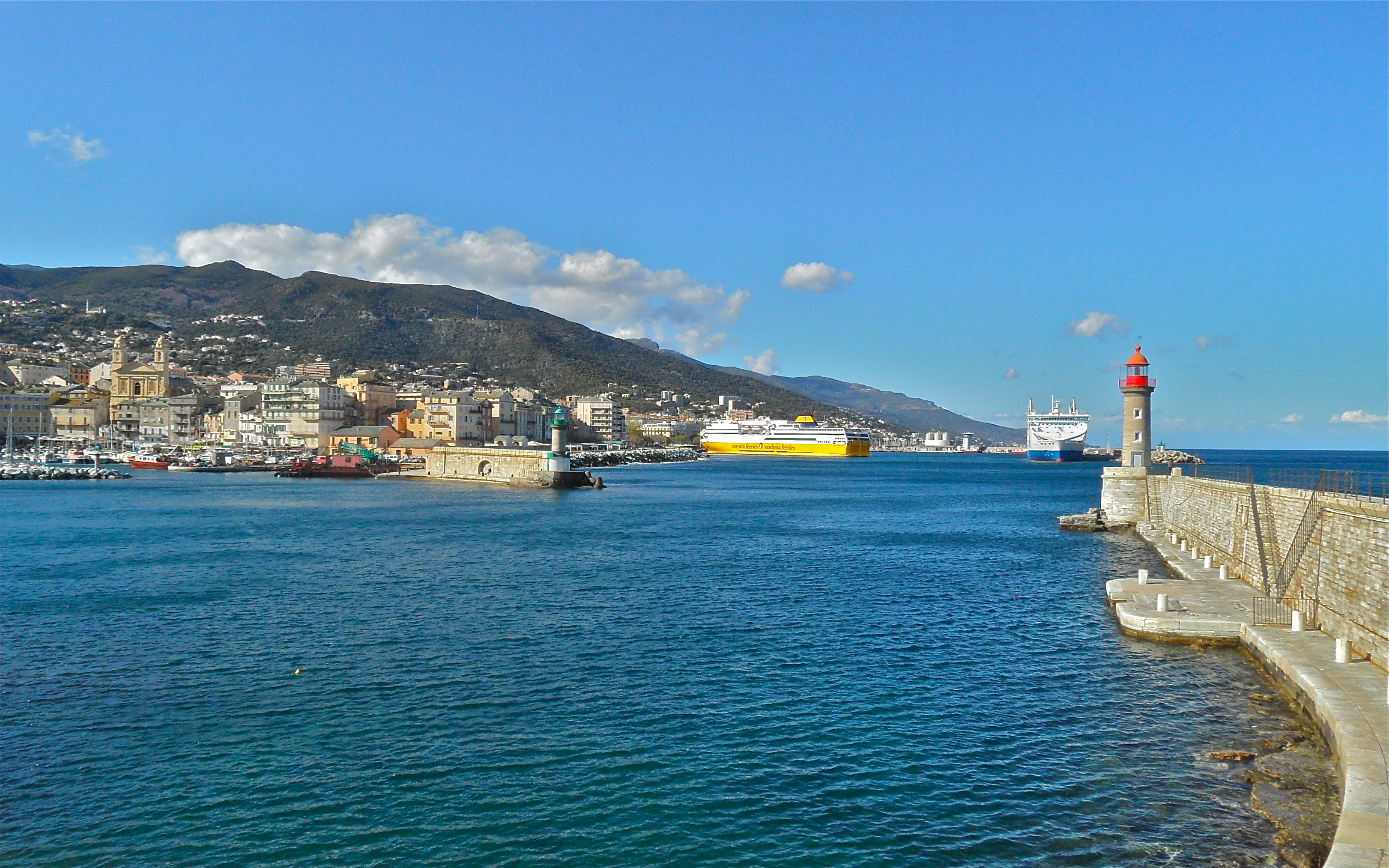 Entrée du port de Bastia, depuis la jetée du vieux port.